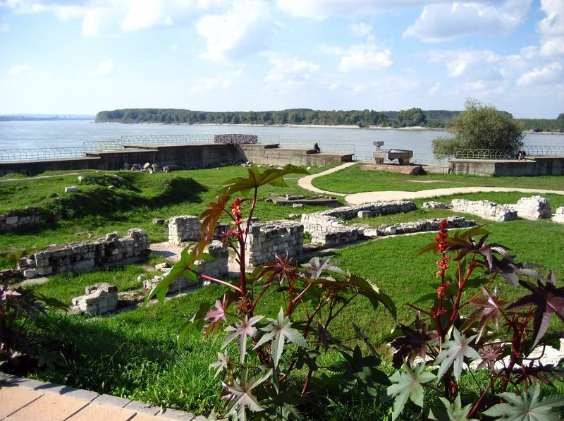 view of the river danube (Silistra)